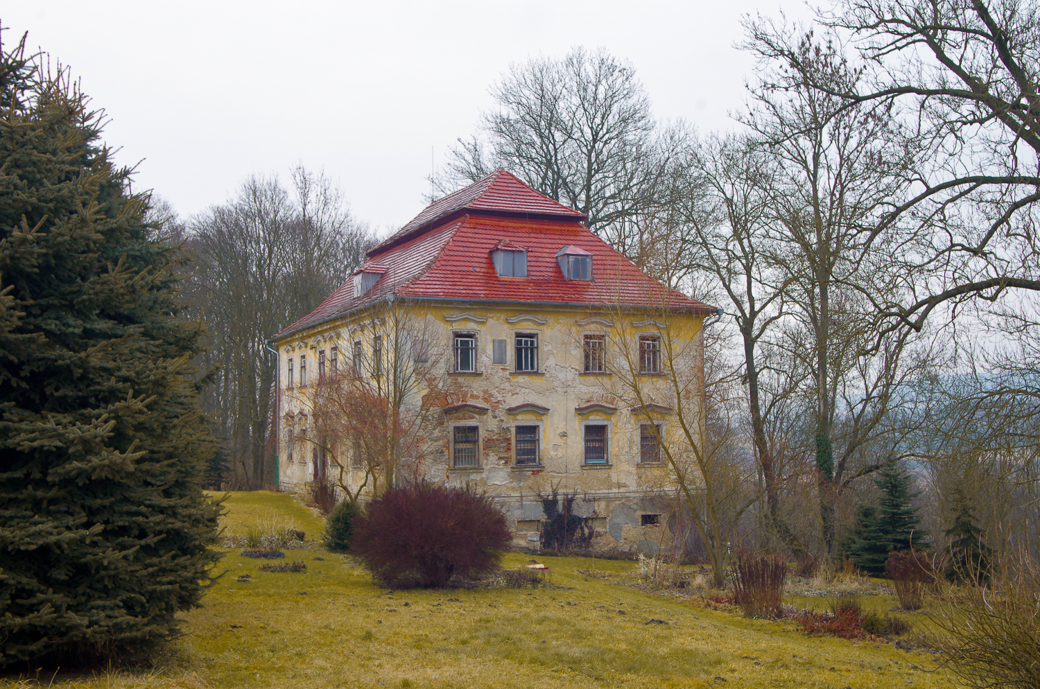 Zámek Starý Dasnice, Chlumek 91, Dasnice